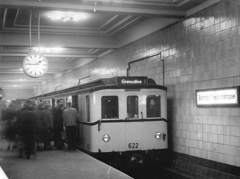 Zentralbild-Junge Zi-Qu 13.1.56 U-Bahnhof Friedrichstrasse in neuem Glanz Der U-Bahnhof in der Friedrichstrasse, Berlin, erstrahlt nun, nach dem bereits vor einiger Zeit die Gerüste gefallen sind, in neuem Glanz. Entsprechend der Bedeutung, die dem Bahnhof in Verbindung mit dem S- und Fernbahnhof als Verkehrsknotenpunkt zukommt, wurde er jetzt würdig gestaltet. UBz. Blick auf den Bahnsteig des U-Bahnhofes Friedrichstrasse.